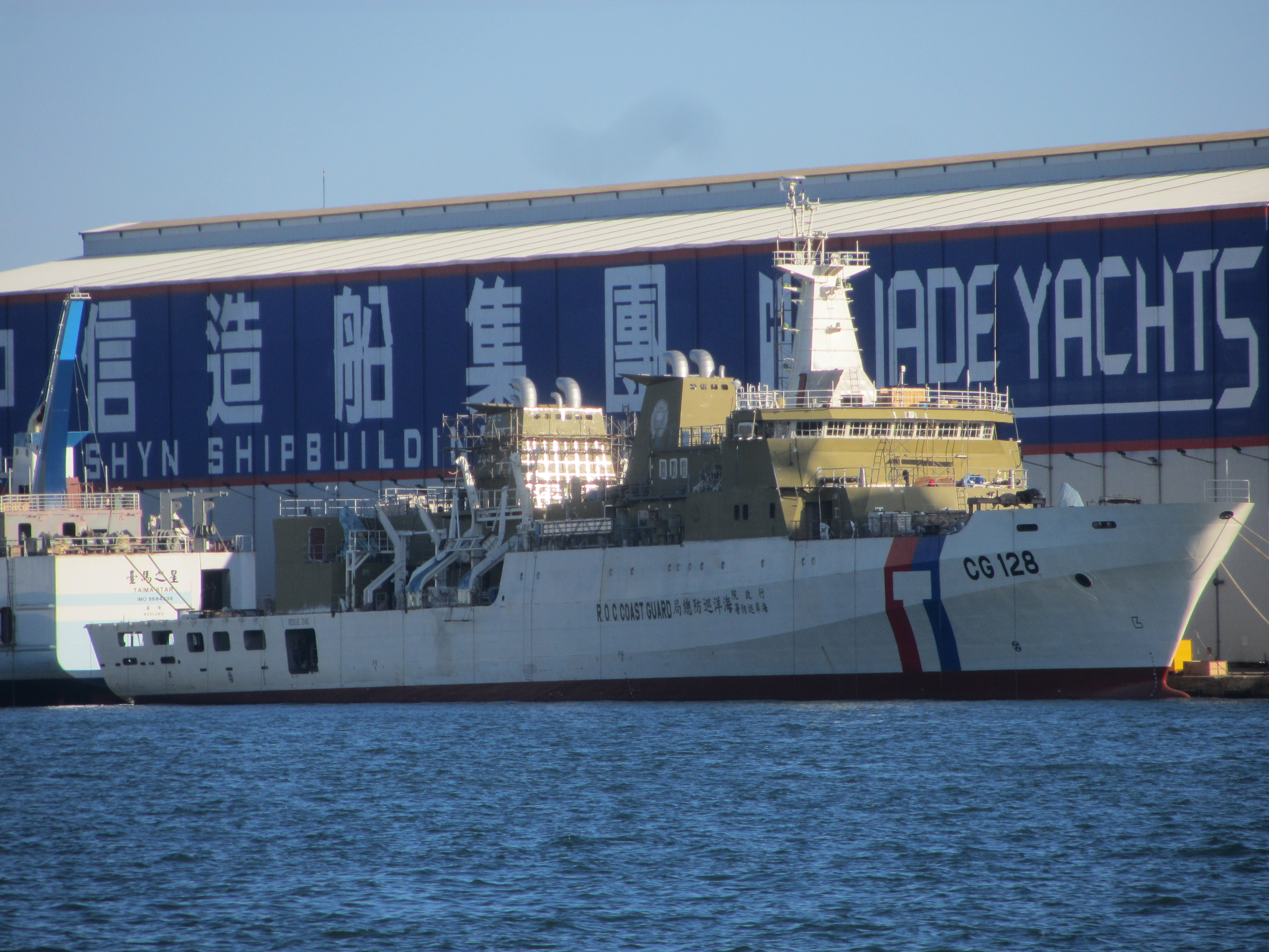 艤裝中的行政院海岸巡防署海洋巡防總局宜蘭艦（CG128）